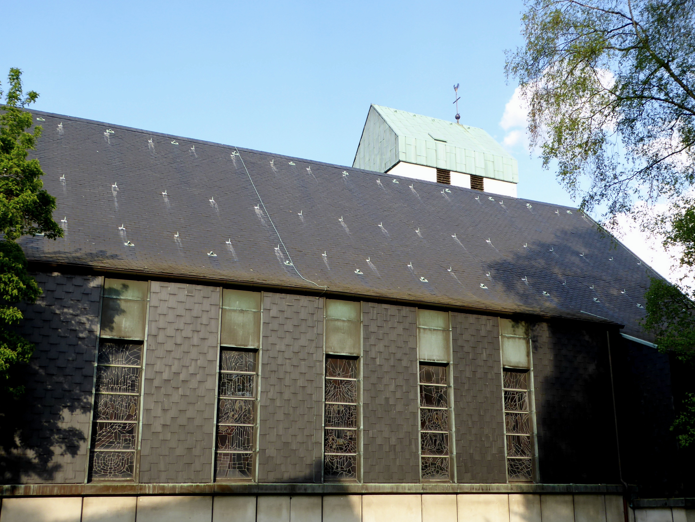 St. Konrad, Außenansicht, Westseite, mit Marienfenstern.